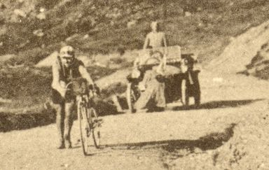 Montée du Tourmalet en Tour de France 1910 (Octave Lapize (24 octobre 1887 à Montrouge-14 juillet 1917 à Toul) est un cycliste français.)